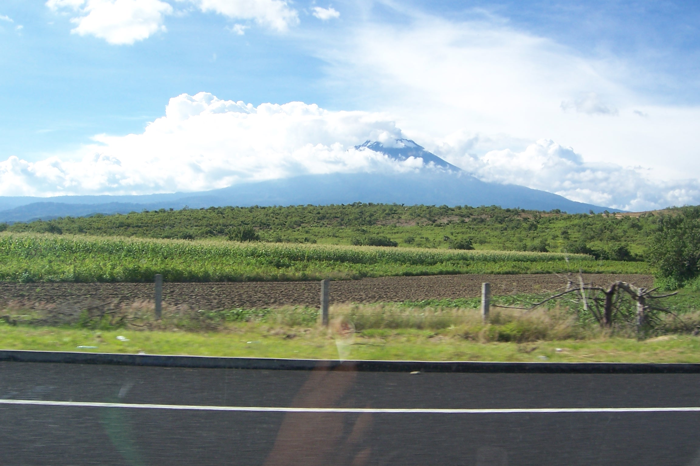 Valle de Atlixco, con el Popo al fondo (Puebla, México)